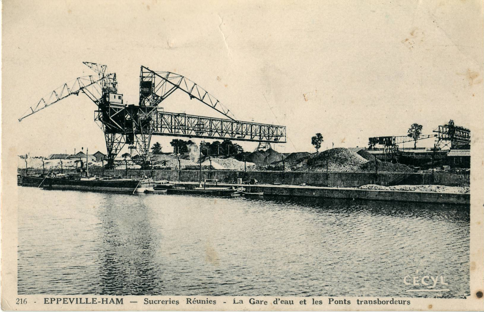 Carte postale ancienne éditée par Cassel-Vasset, sous la marque Cécyl EPPEVILLE-HAM : Sucreries réunies - La Gare d'eau et les Ponts transbordeurs